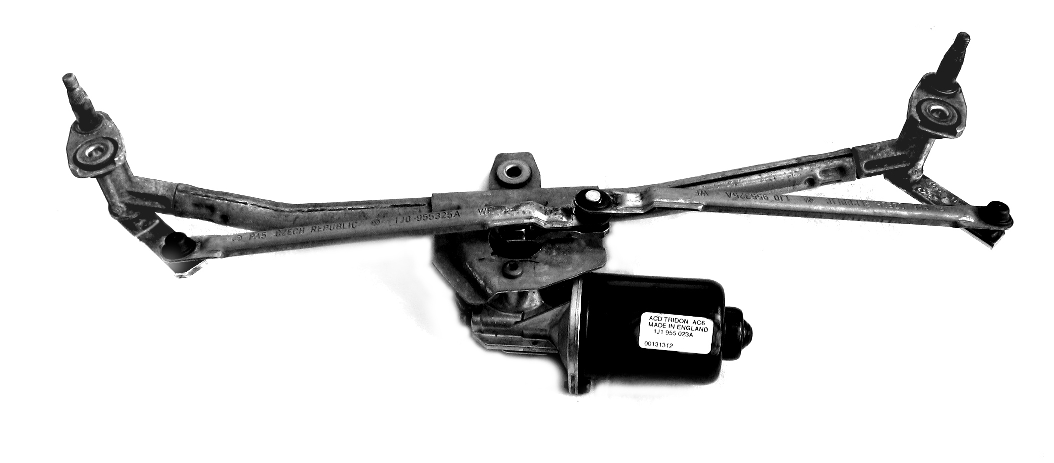 Wischergetriebe VW